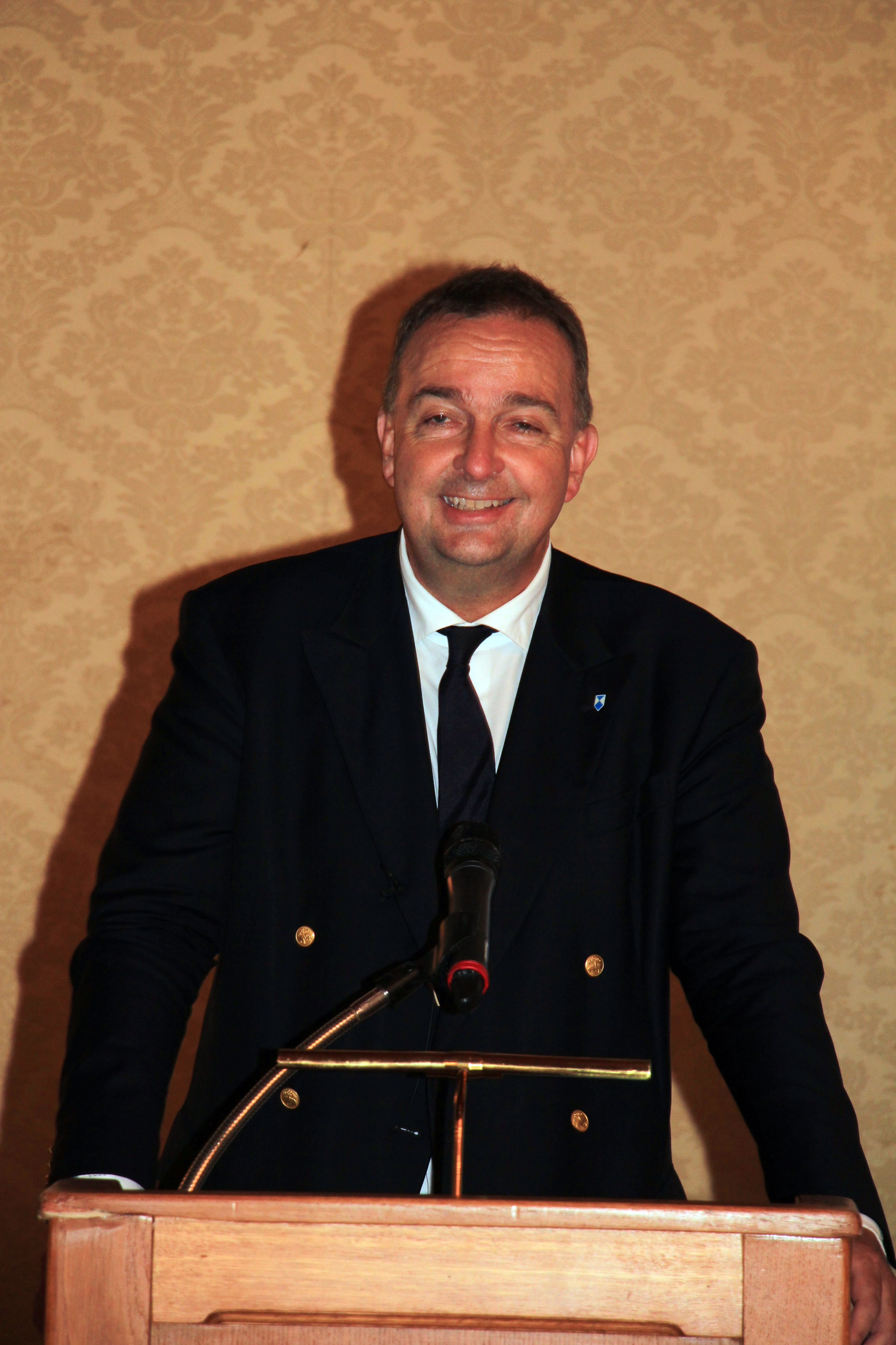 Generalversammlung der Organisation Blue Shield International im Wiener Rathaus